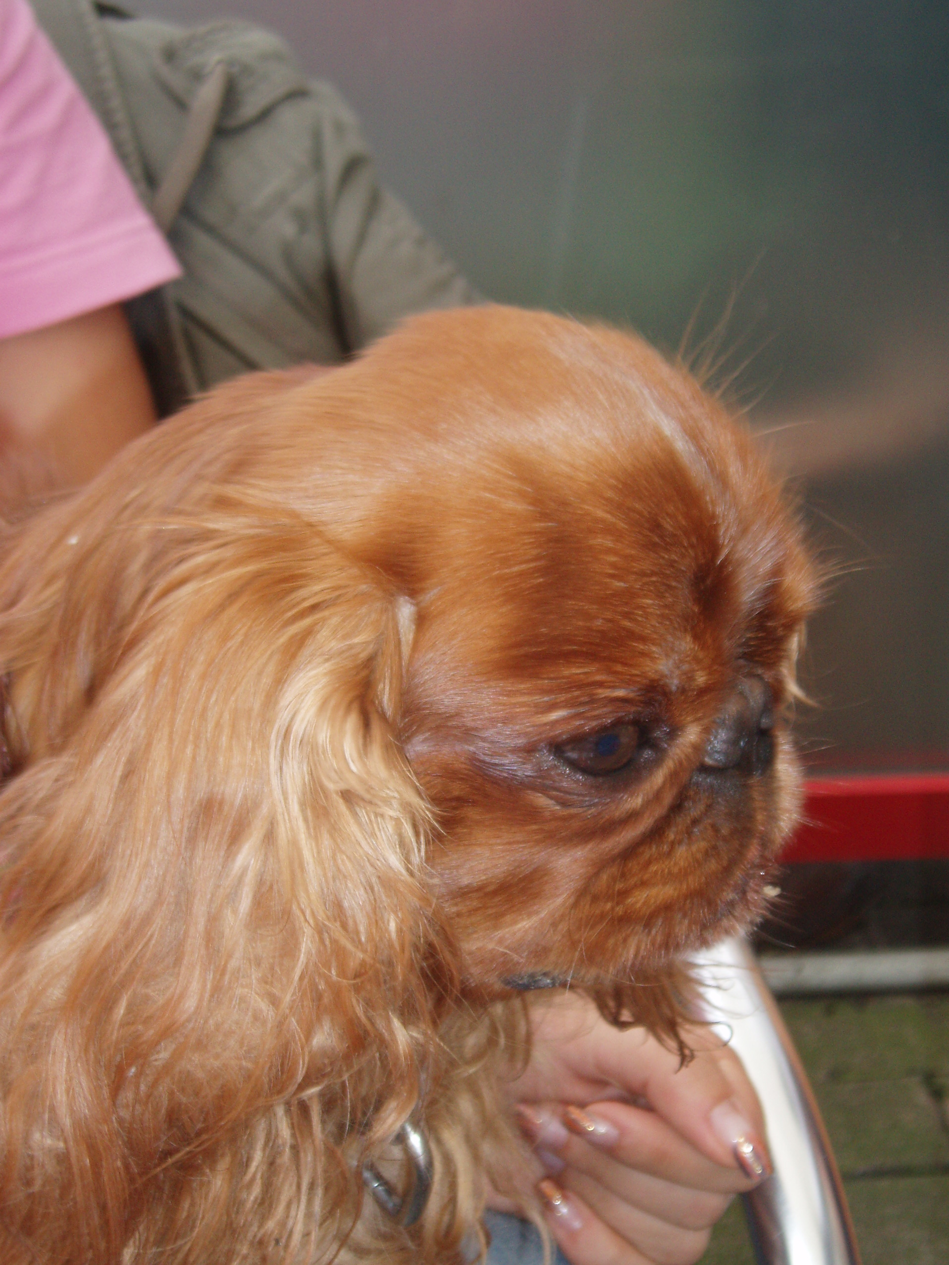 King Charles Spaniel